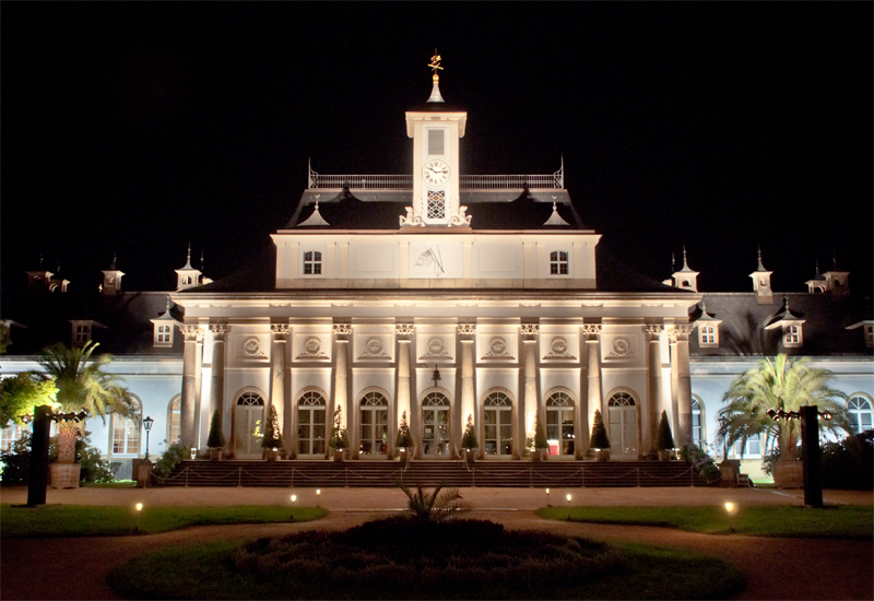 Diese Foto wurde am Abend vor der Schlossnacht 2011 geschossen.